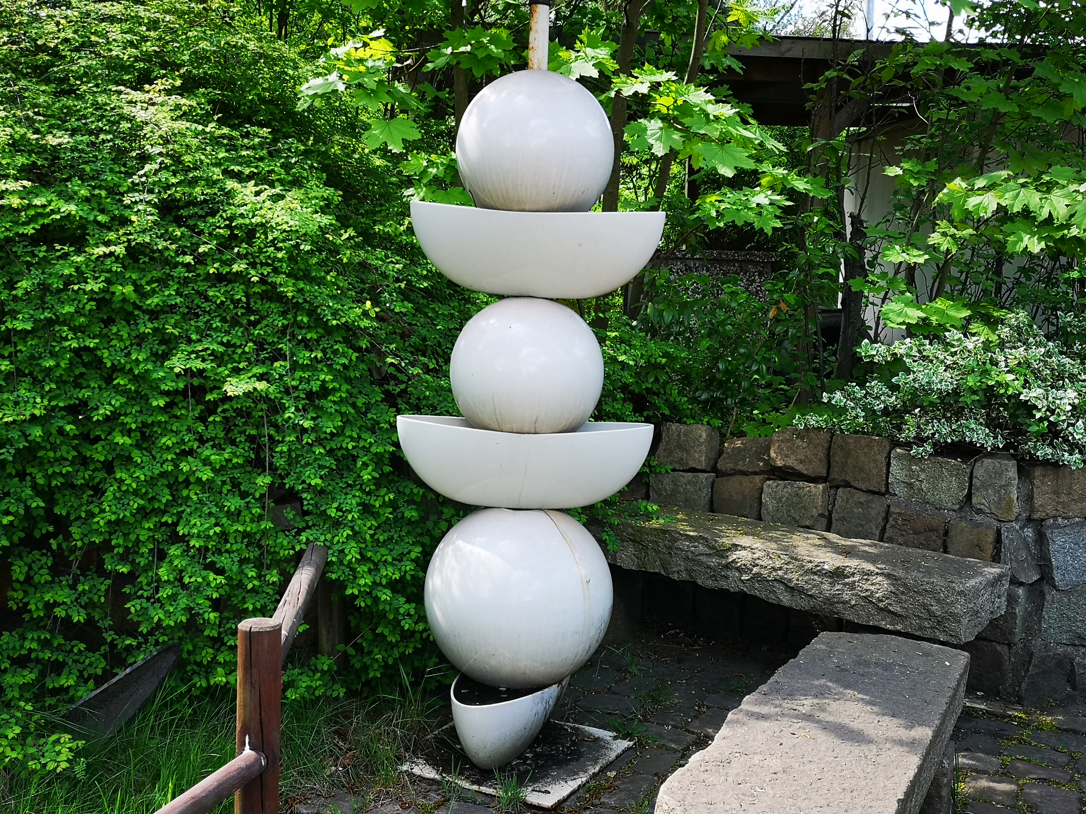 Grüne Oasen für Seeleute bei Duckdalben